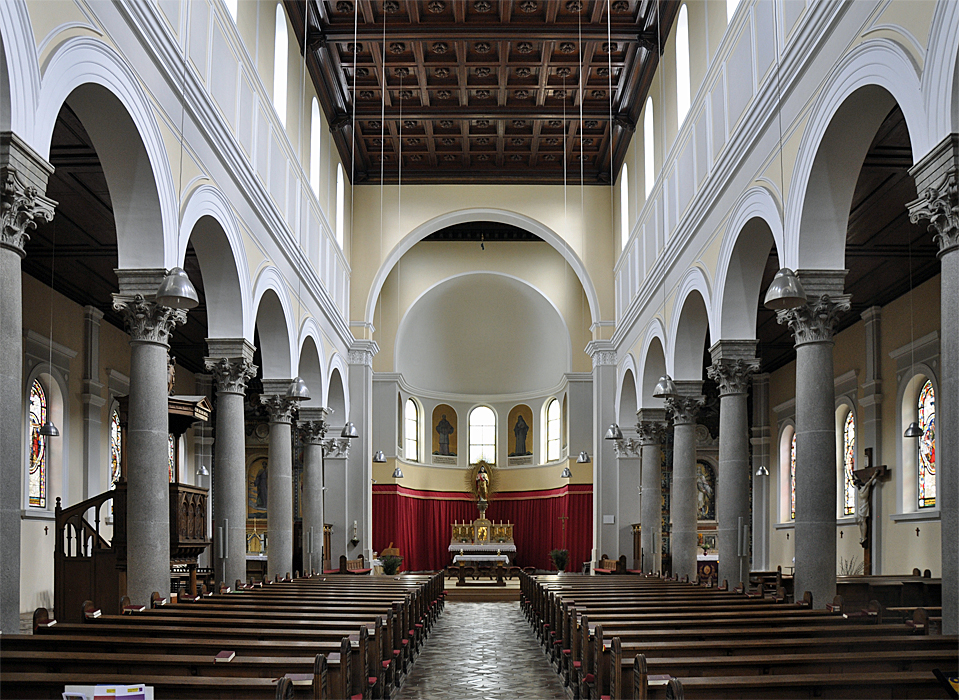 Pfarrkirche Kaisermühlen, Wien